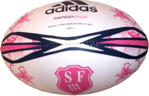 Le ballon de rugby du Stade Français Paris conçu par Adidas.